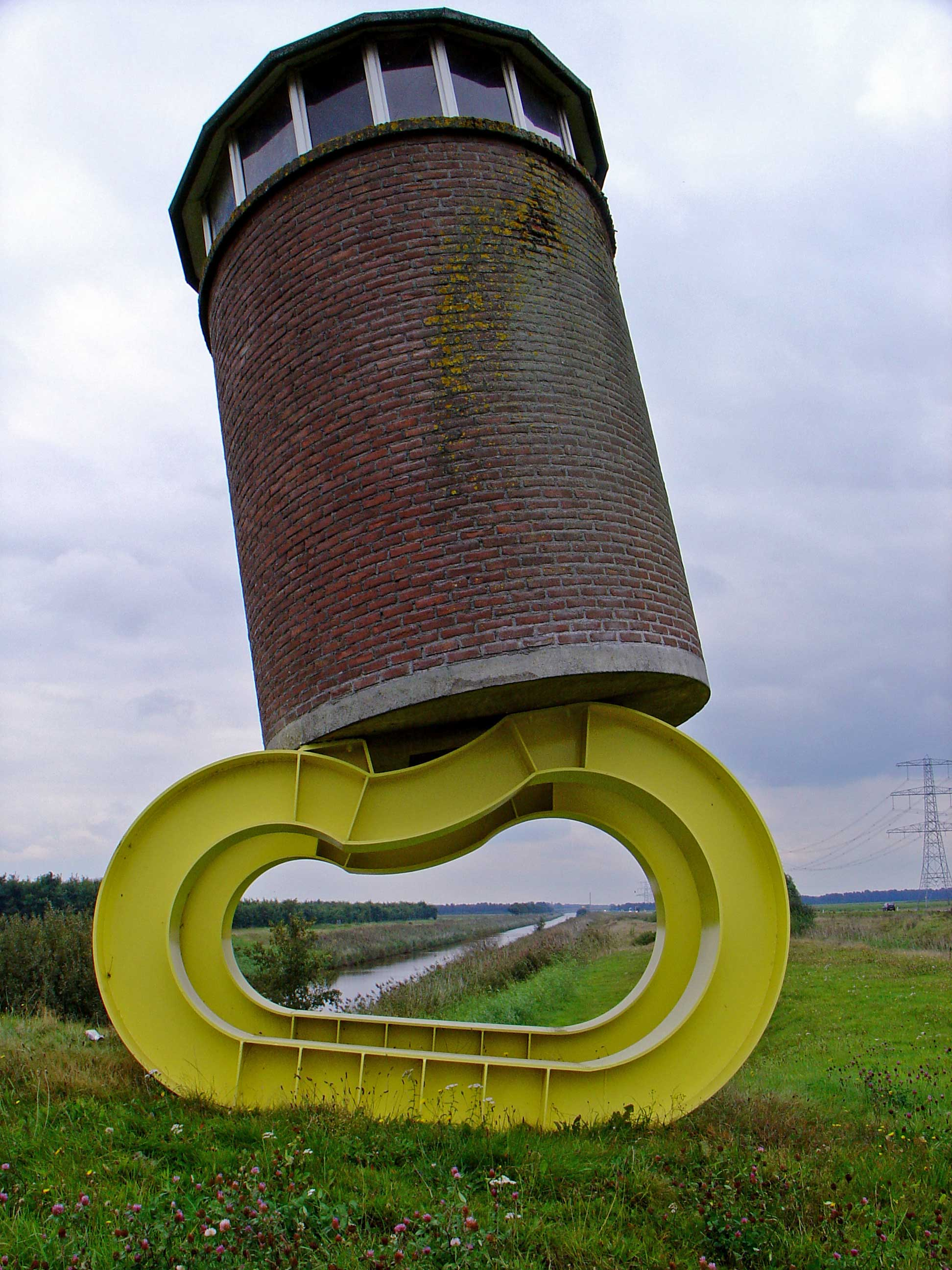 Waving, not drowning door Kie Ellens langs het A.G. Wildervanckkanaal en de N366 (S10) bij 1e Oomsberg ter hoogte van Musselkanaal (gemeente Stadskanaal)